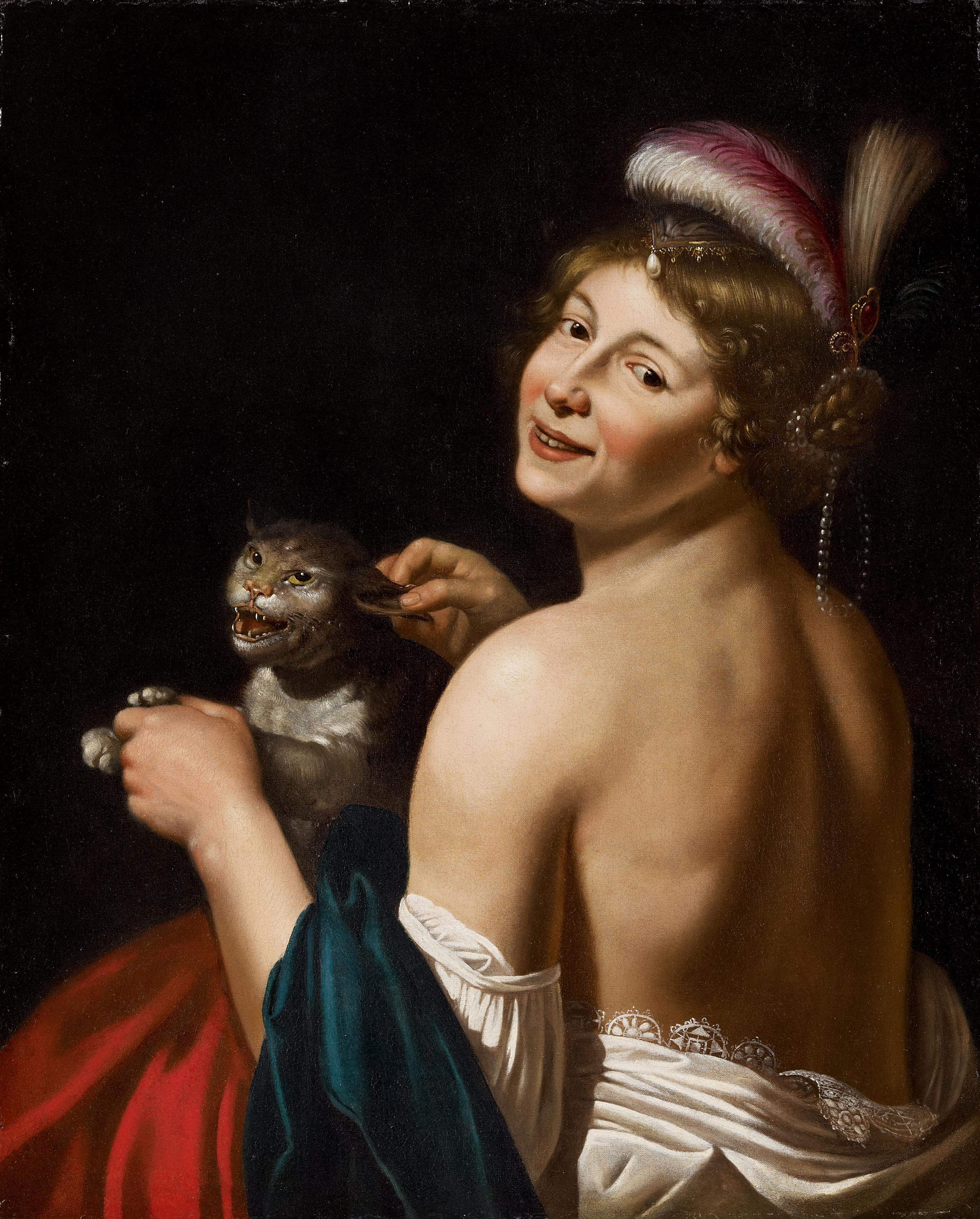 Eine Kurtisane am Ohr einer Katze ziehend. Allegorie des Tastsinns. Öl auf Leinwand. 83,5 x 68 cm.